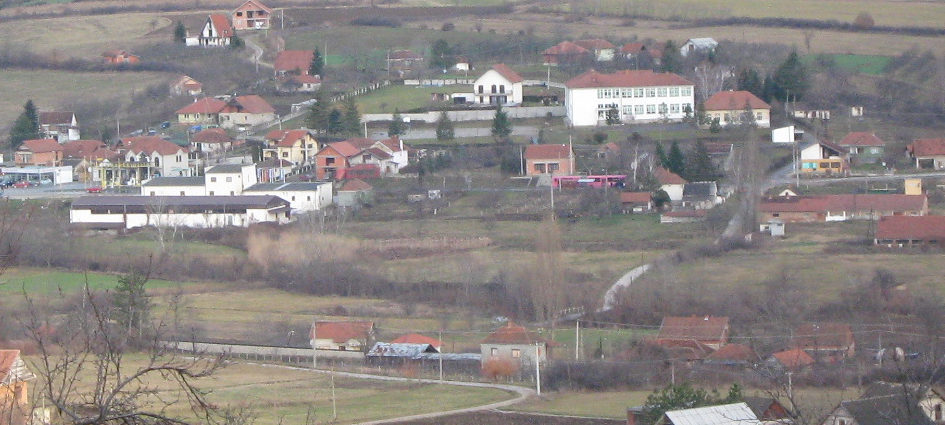 Део насеља код основне школе.